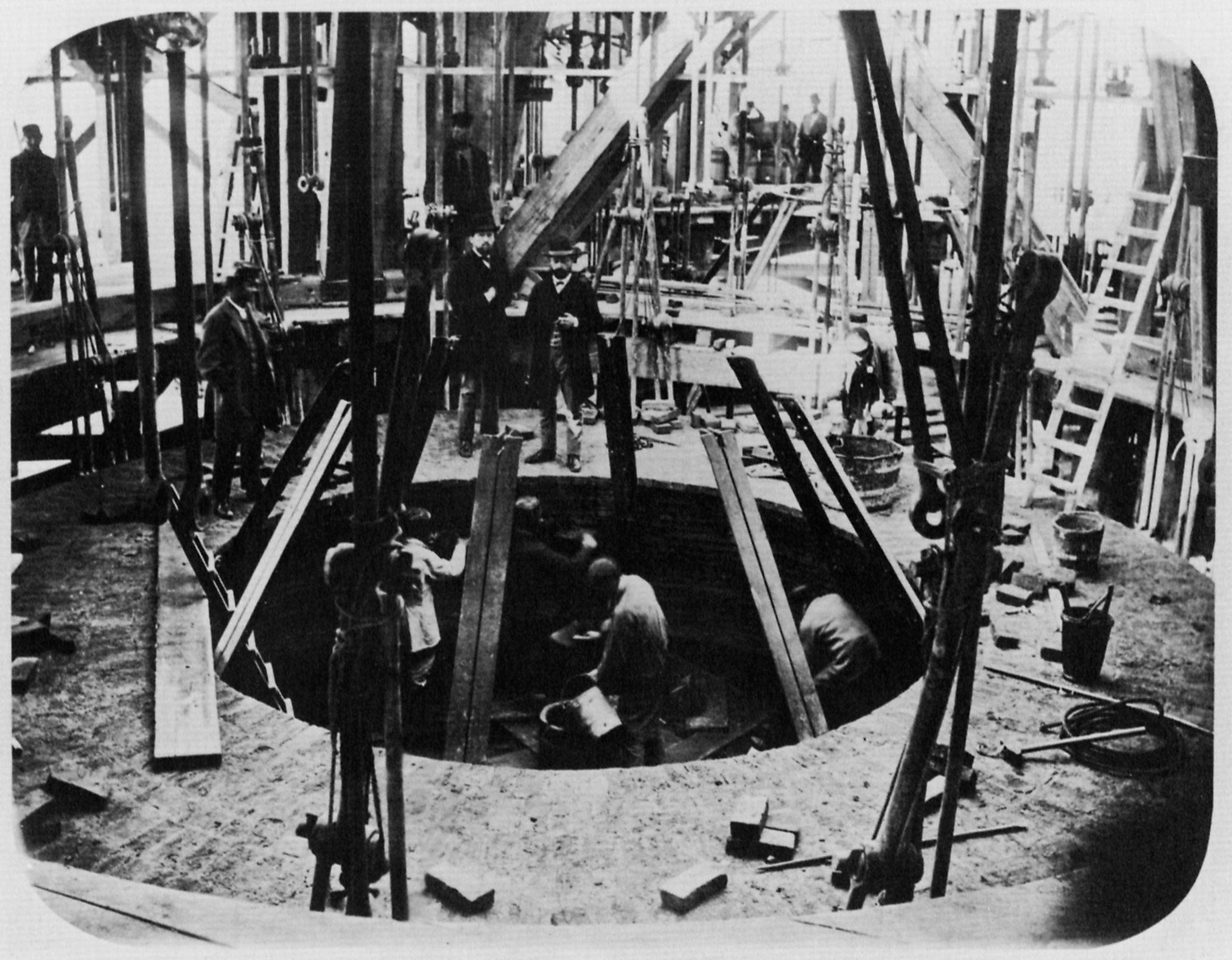 Deutscher Photograph um 1869: Rheinbrücken-Baustelle bei Hamm. Mauerwerk der Senkglocken